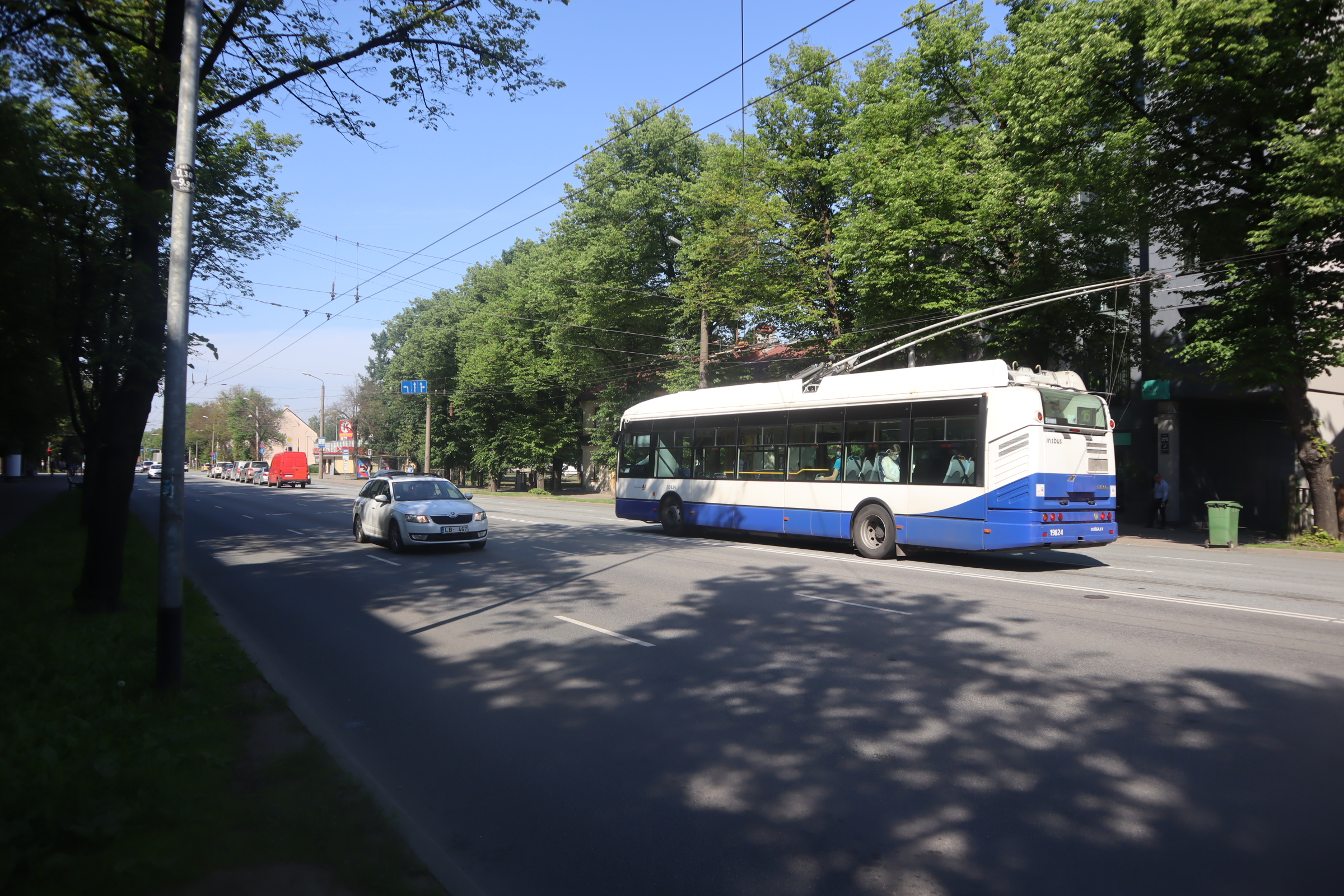 16. maršruta trolejbuss (Šmerlis-Pļavnieki) brauc pa Brīvības gatvi, netālu no pieturas "Zemitāna laukums".